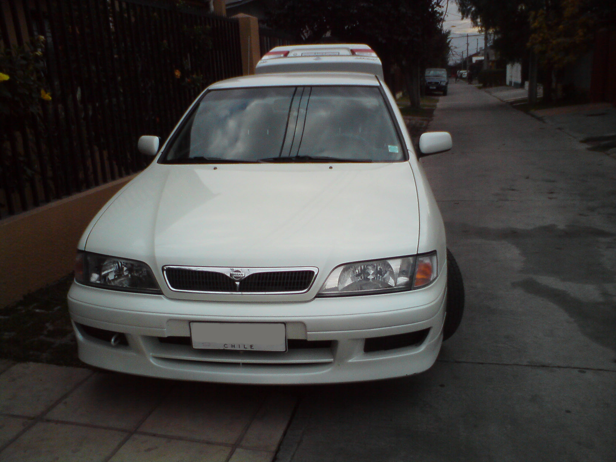 Nissan Primera P11 GX Año 2000.